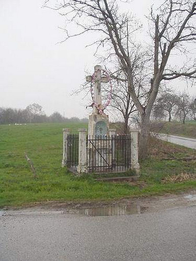 Gornji Lipovčani - Cross on the crossroad